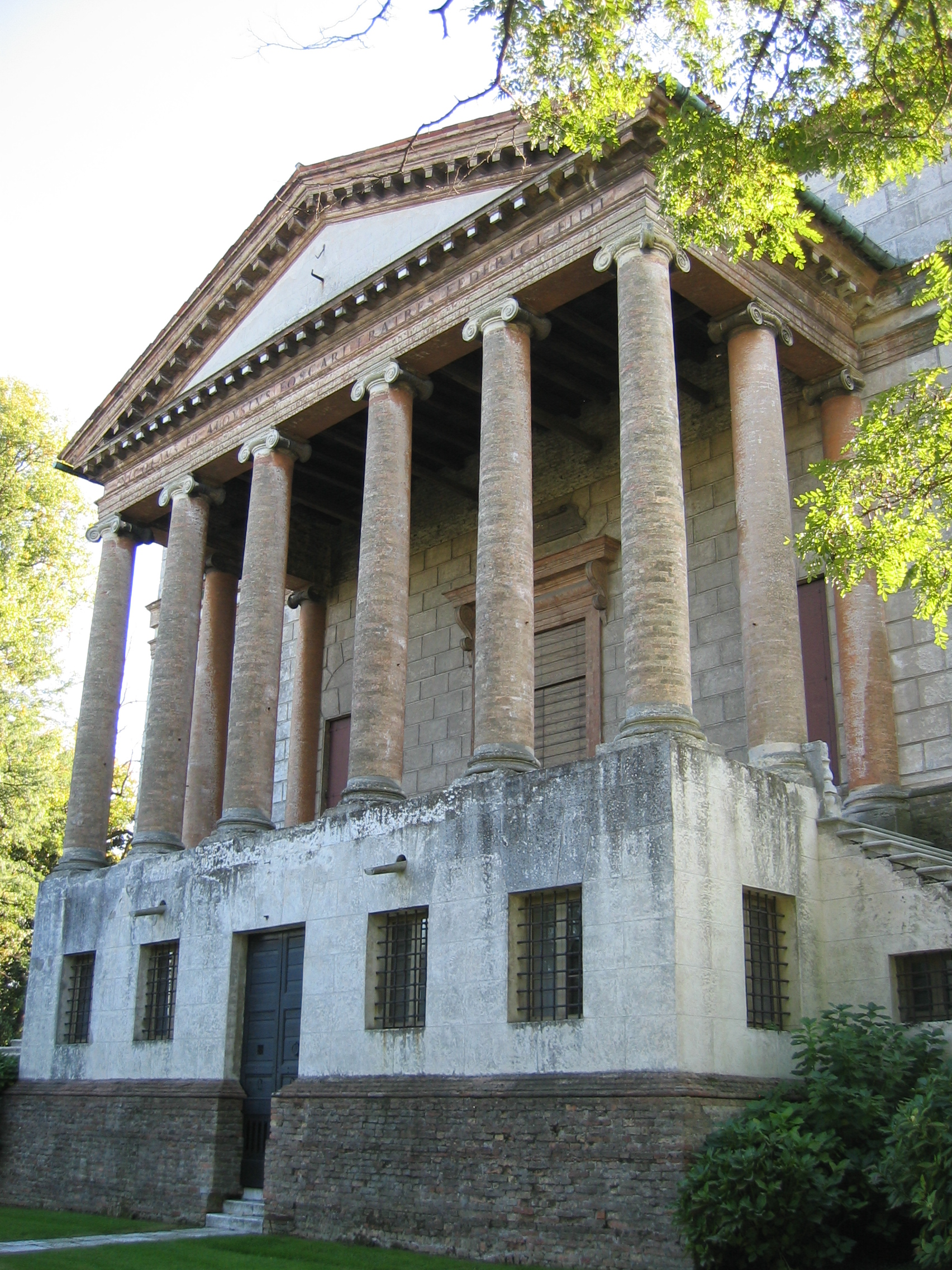 Villa near Venezia